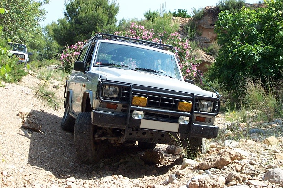 Nissan Patrol, modelo clásico.